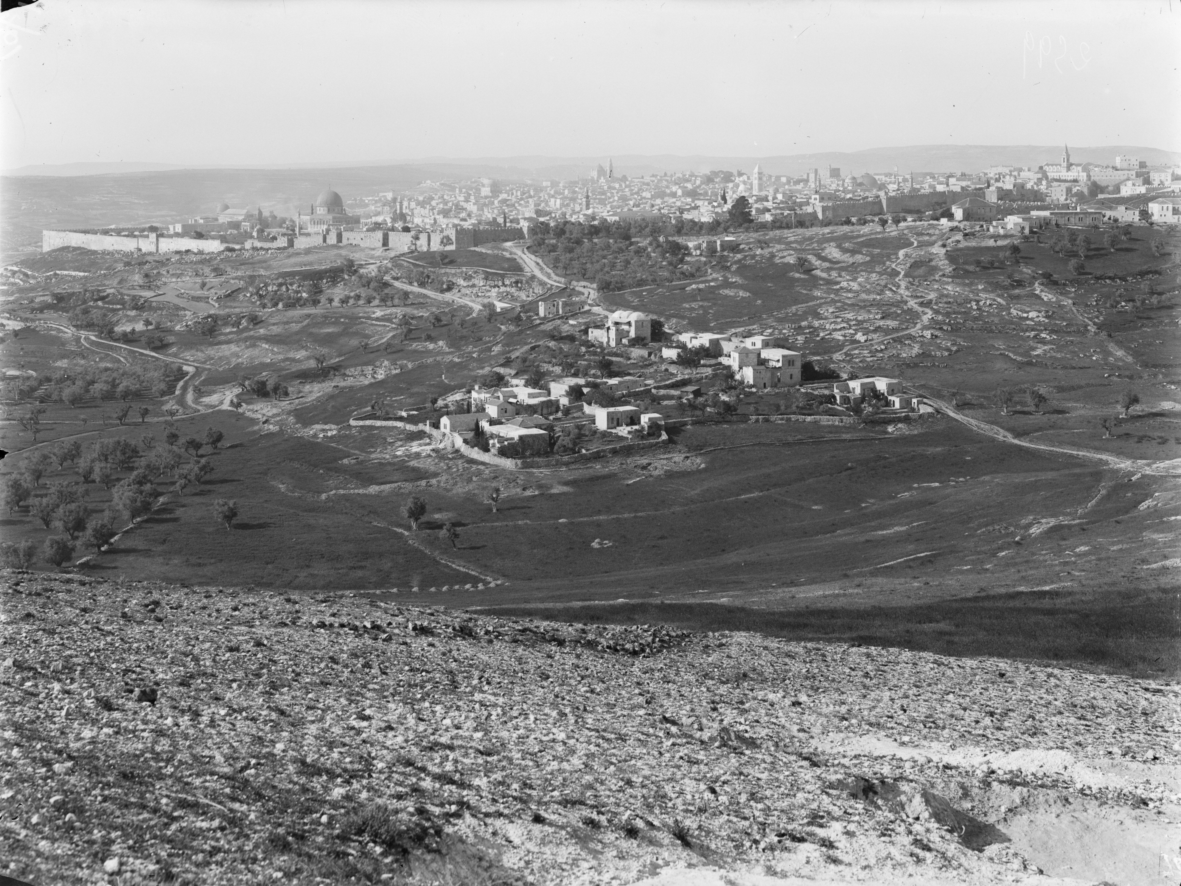 Collectie / Archief : Fotocollectie Van de Poll Reportage / Serie : [ onbekend ] Beschrijving : panorama, steden, Jordanië Datum : ongedateerd Locatie : Jeruzalem, Jordanië Trefwoorden : panorama, steden Fotograaf : Poll, Willem van de Auteursrechthebbende : Nationaal Archief Materiaalsoort : Negatief (zwart/wit) Nummer archiefinventaris : bekijk toegang 2.24.14.02 Bestanddeelnummer : 254-6116